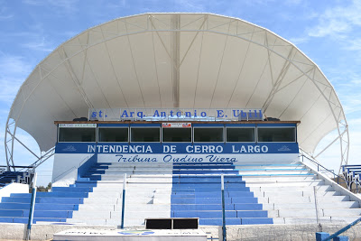 Cerro Largo juega de local en el Estadio Municipal "Arquitecto Antonio Eleuterio Ubilla" de la ciudad de Melo. El mismo es propiedad de la Intendencia de Cerro Largo, pero el club tiene la concepción del mismo, mientra este dispute campeonatos en forma profesional. Comparte su uso con la Selección Departamental Mayor, la Selección Departamental Sub-18 y con los clubes de la Liga Departamental de Fútbol de Cerro Largo. Fue habilitado por la AUF para recibir a los equipos grandes y por la Conmebol para recibir partidos de Copa. En 2012 fue remodelado y se mejoró su infraestructura y hoy cuenta con una capacidad máxima de 15.000 espectadores, esto fue para que Cerro Largo Futbol Club disputara la Copa Sudamericana. El martes 14 de agosto de 2012, el Estadio Ubilla recibió su primer partido internacional: empate a cero entre Cerro Largo y Aurora de Bolivia.